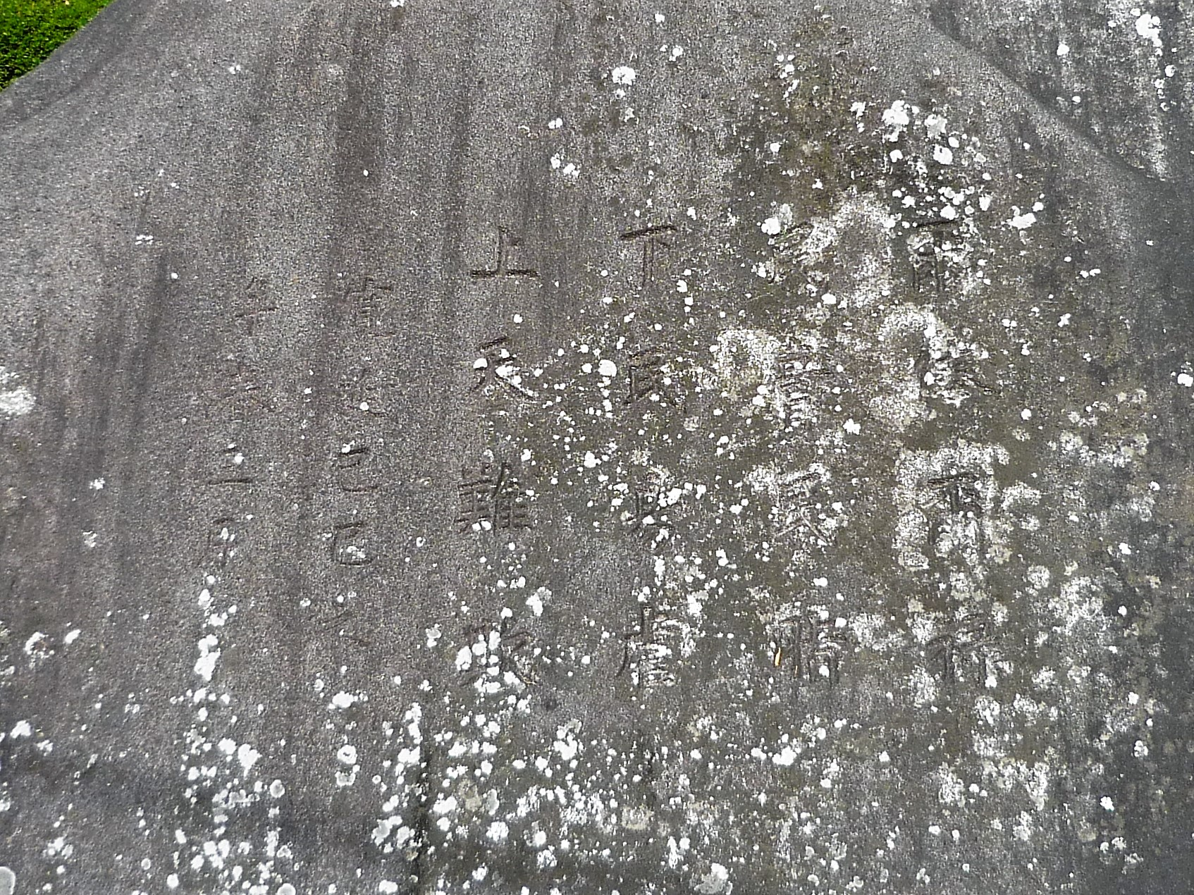 旧二本松藩戒石銘碑 Panasonic Lumix DMC-FS3